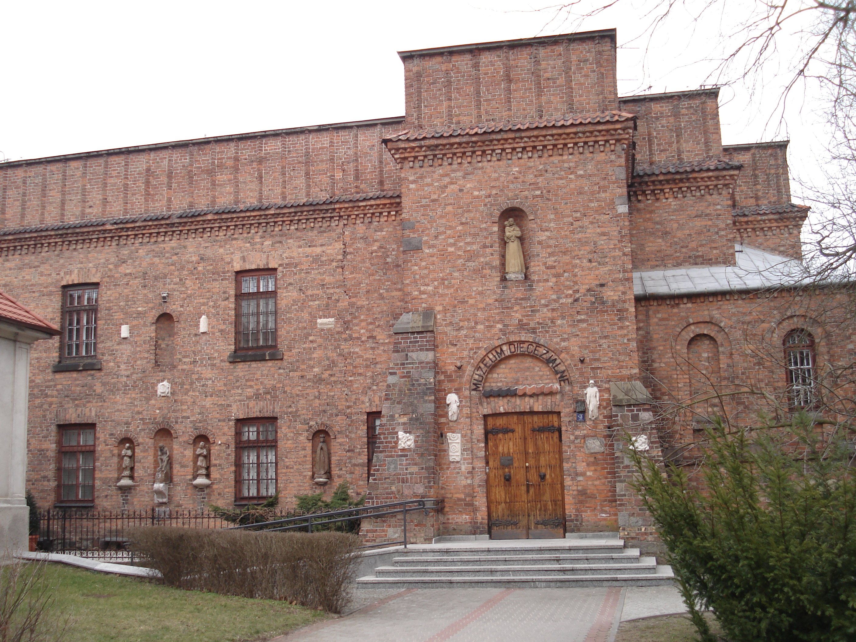 Muzem Diecezjalne w Płocku (siedziba macierzysta)